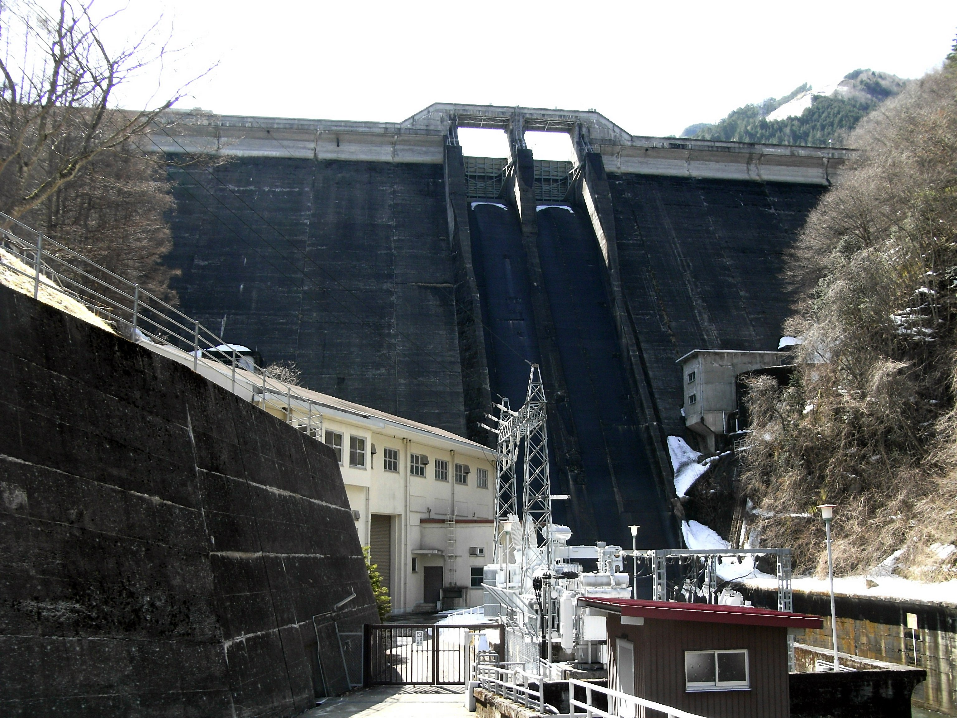 Dam